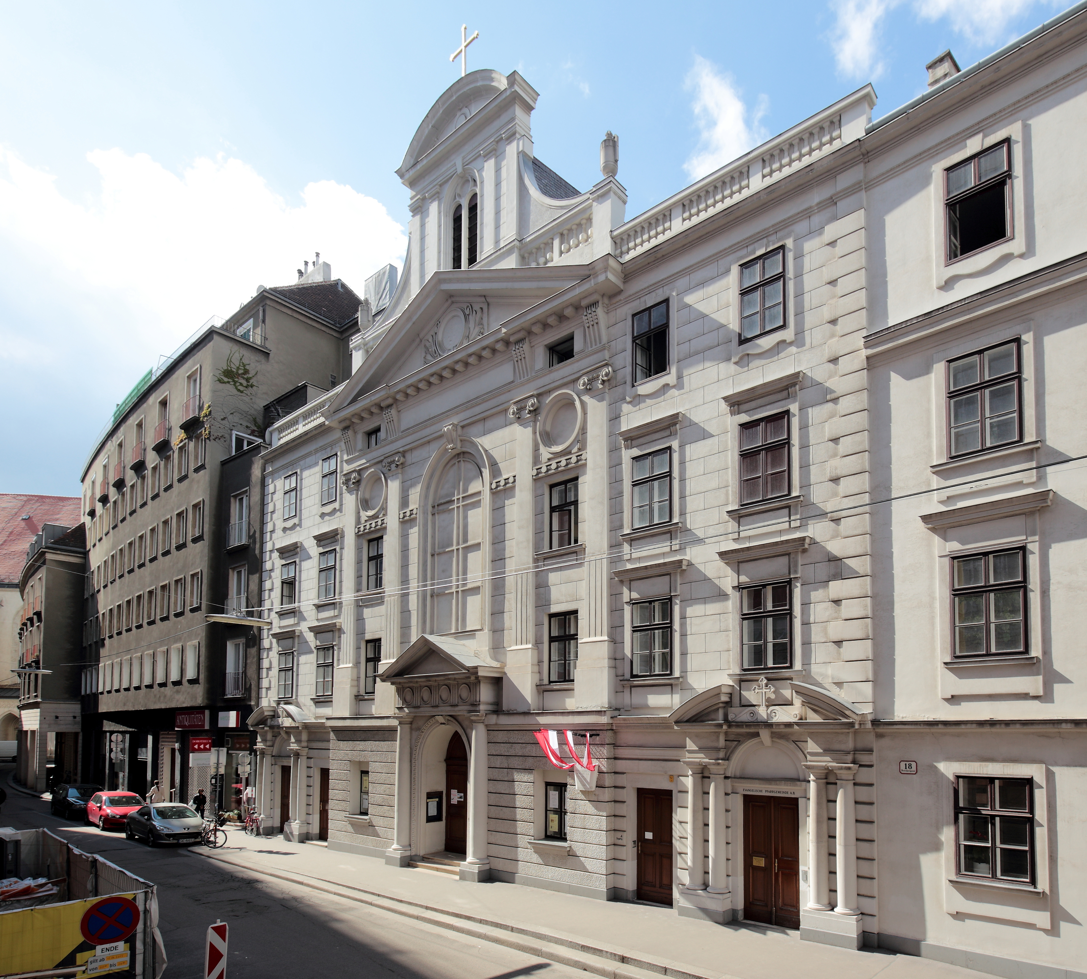 Fassade der Lutherischen Stadtkirche in der Dorotheergasse im 1. Wiener Gemeindebezirk Innere Stadt.Die Lutherische Stadtkirche wurde als katholische Klosterkirche des Königinklosters (Kloster der Klarissen) in den Jahren 1582 bis 1583 errichtet. Im Zuge der Josephinische Kirchenreformen wurde das Kloster zwangsweise aufgelöst. Aufgrund des Toleranzpatentes (1781) kaufte die evangelische Gemeinde A.B. 1782/83 einen Teil des Klosters, inklusive der Klosterkirche. Da den Bestimmungen des Toleranzpatents zufolge die Kirche von außen nicht als solche erkennbar sein durfte, wurden unter anderem die drei Kirchtürme abgetragen. Nach dem Erlaß des Protestantenpatentes (Gleichstellung mit der röm.-kath. Kirche, 1861) erfolgte 1876 ein größerer Umbau durch den Architekten Otto Thienemann. Hierbei wurde die Fassade so umgestaltet, dass die Kirche auch von außen als solche erkennbar war. Im Jahr 1907 erfolgte ein neuerlicher Umbau (das Innere der Kirche wurde um 180 Grad gedreht und der Ausgang des Kirchenraums zur Dorotheergasse hin verlegt). Im 2. Weltkrieg wurde die Kirche schwer beschädigt. Im Anschluß erfolgte im Jahr 1948 eine einfache Wiederinstandsetzung. Diese Umgestaltung wurde 1989 rückgängig gemacht und die neoklassizistische Fassade in der Form von 1907 wieder hergestellt.